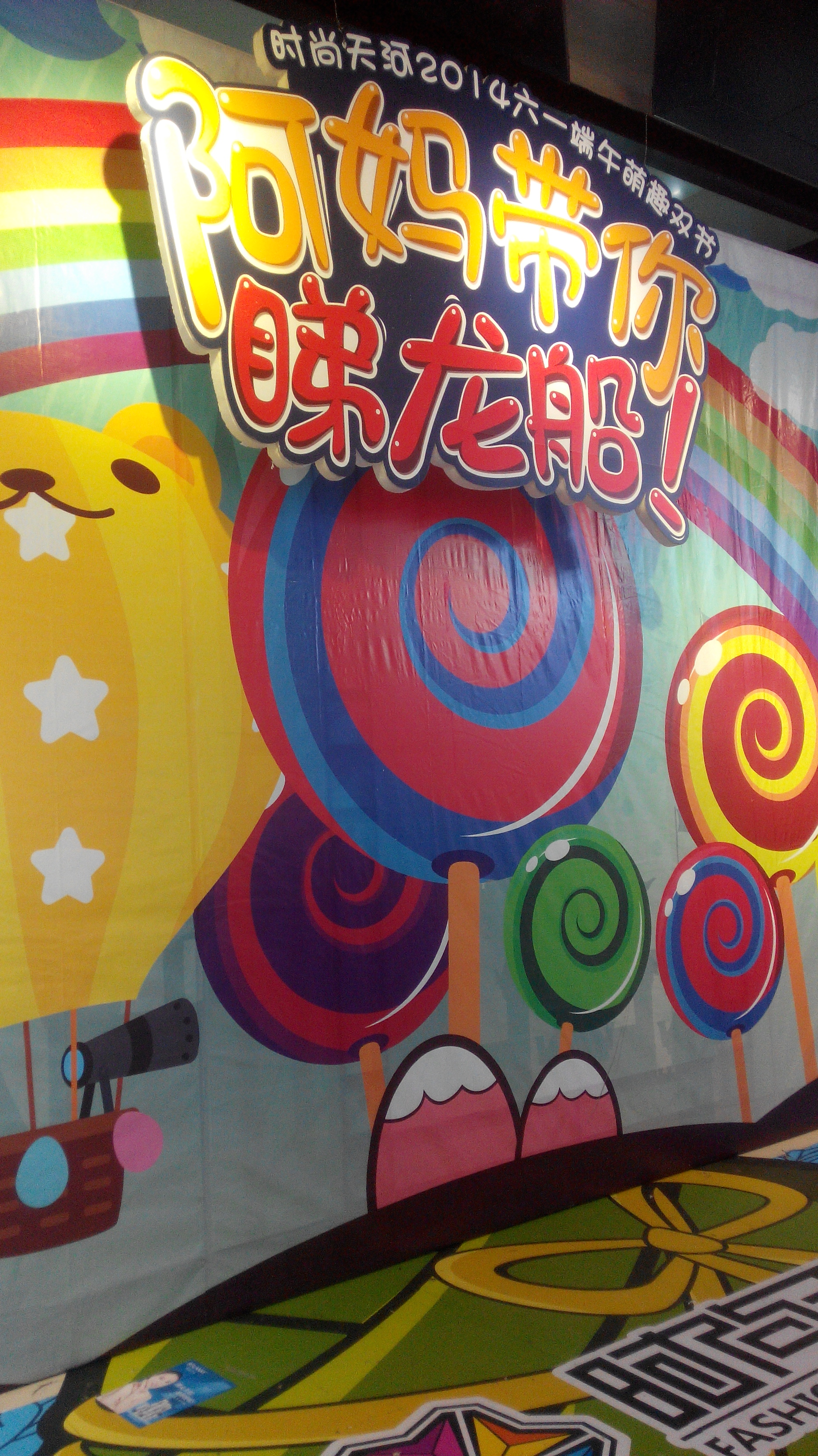 廣州市時尚天河商業廣場的「阿媽帶你睇龍船」佈景板，出自粵語兒歌《氹氹轉，菊花園》。版權說明：使用本相片必須署名，否則CC協議將失效，並追究相應的法律責任。